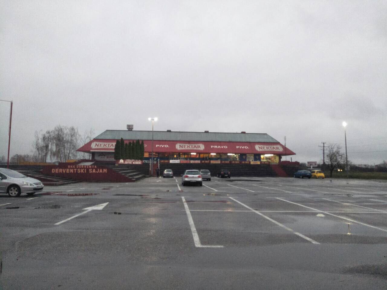 Sportsko-kulturni centar Derventa